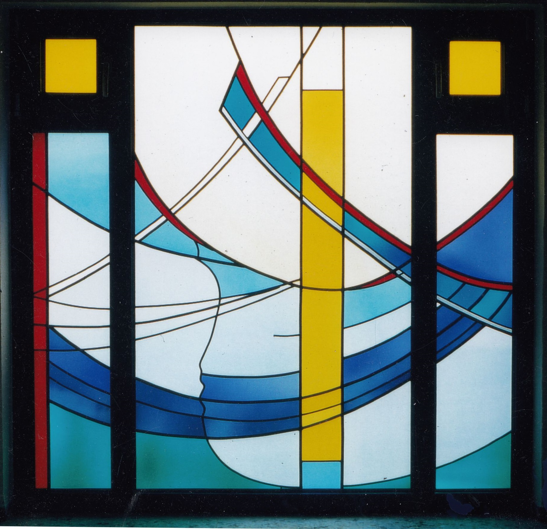 Garderobenfenster der Lichtenplatzer Kapelle nach einem Entwurf von Katja Garbe